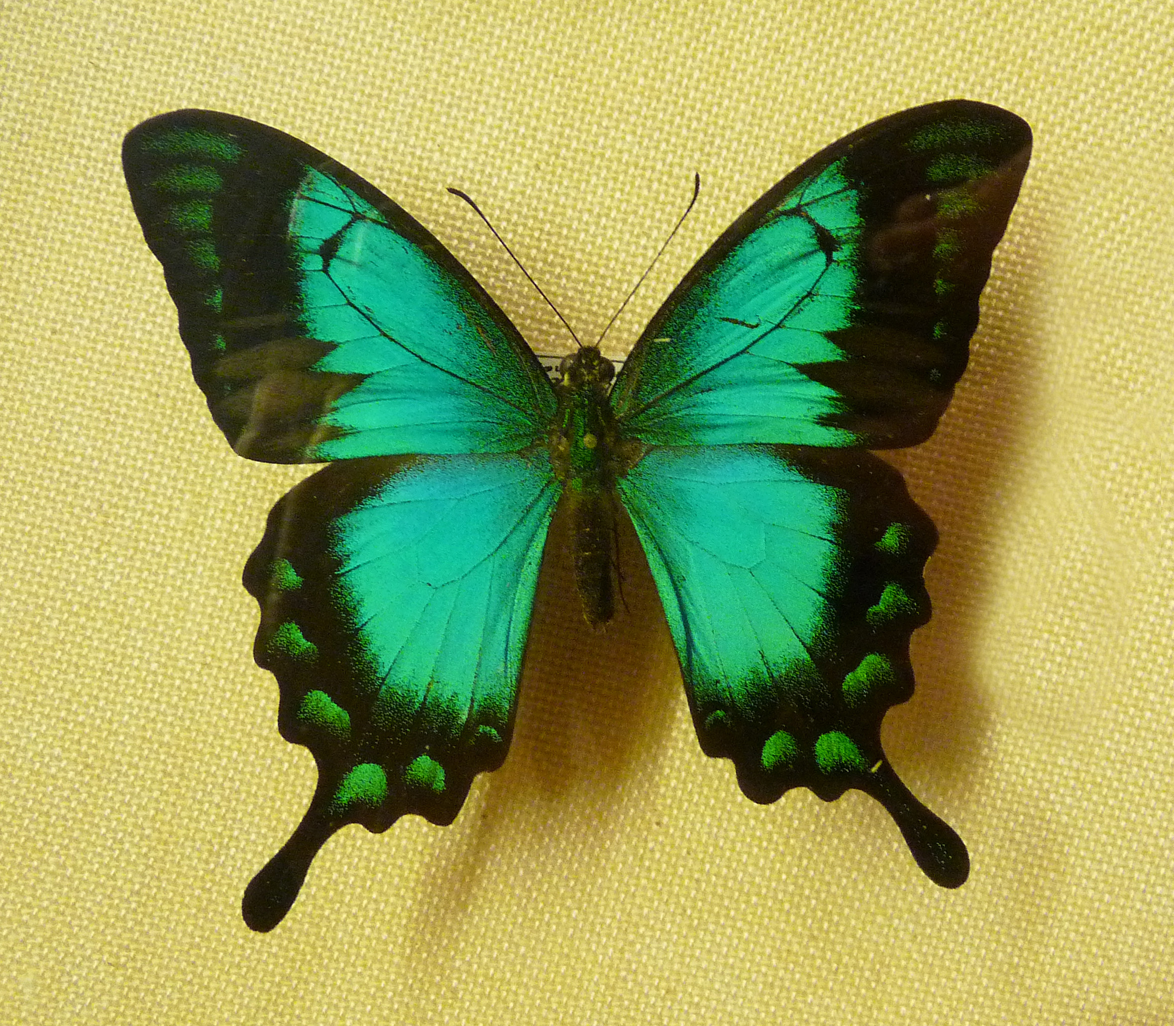 Papilio lorquinianus C. & R. Felder, 1865 (Nouvelle-Guinée) au Musée zoologique de Strasbourg